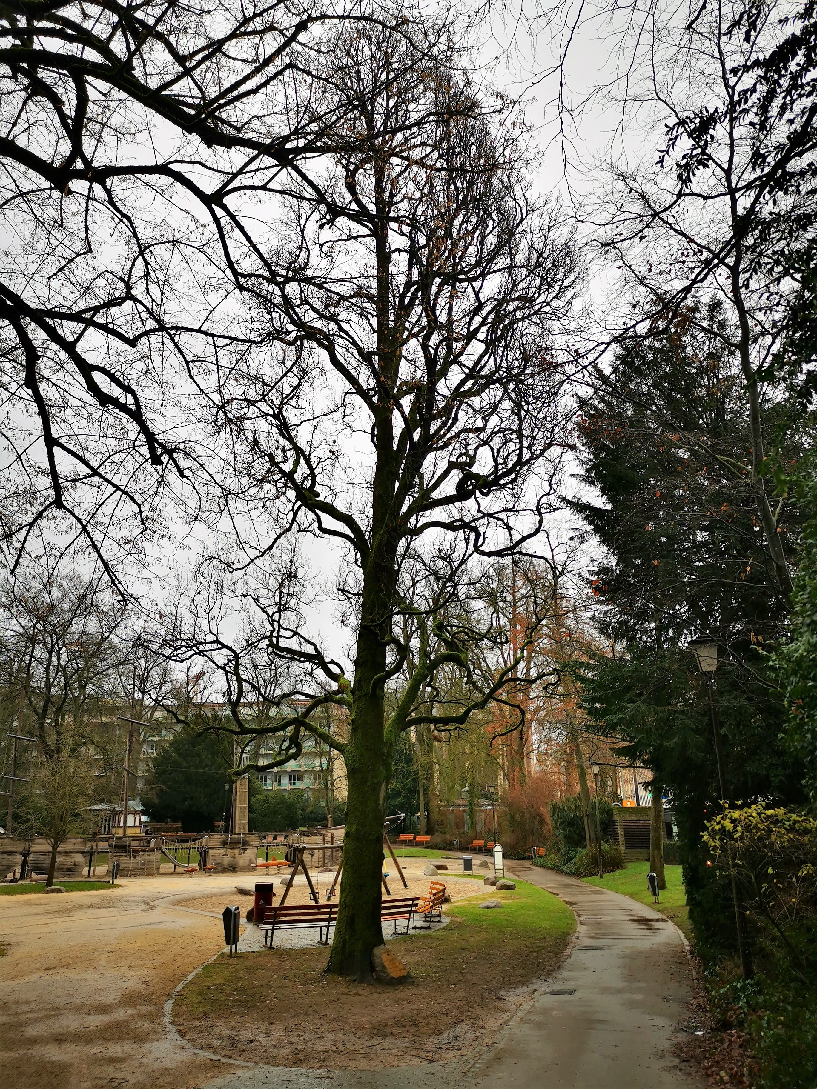 Luxembourg, le chêne Krombach planté en mémoire du botaniste Jean-Henri-Guillaume Krombach (1791-1881).